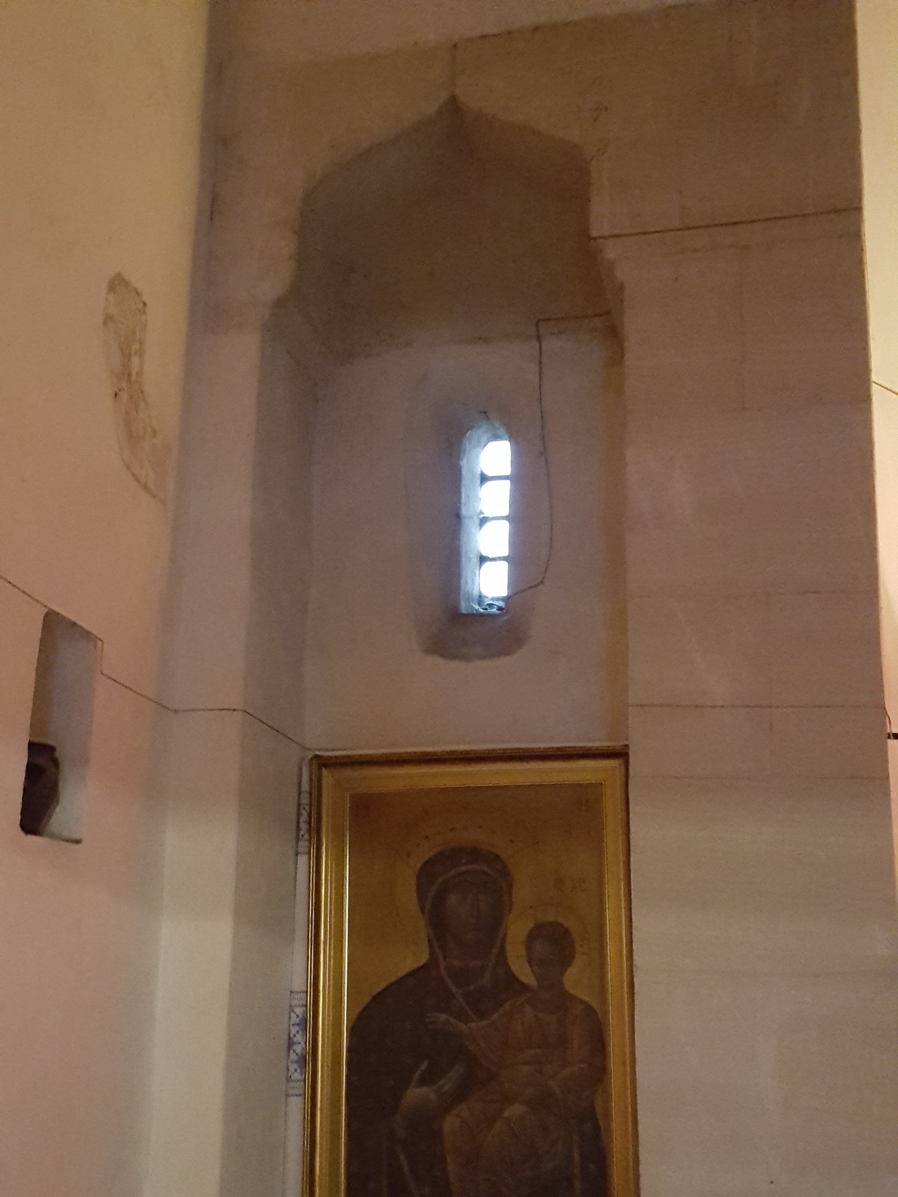 Apsydy boczne w formie wnęk wybranych w ścianie wschodniej nawy oraz łuki w ośli grzbiet wsparte na profilowanych impostach znajdują analogię do arkad prowadzących do wąskich pomieszczeń po bokach absydy środkowej katedry ormiańskiej we Lwowie wzniesionej po 1363 roku.